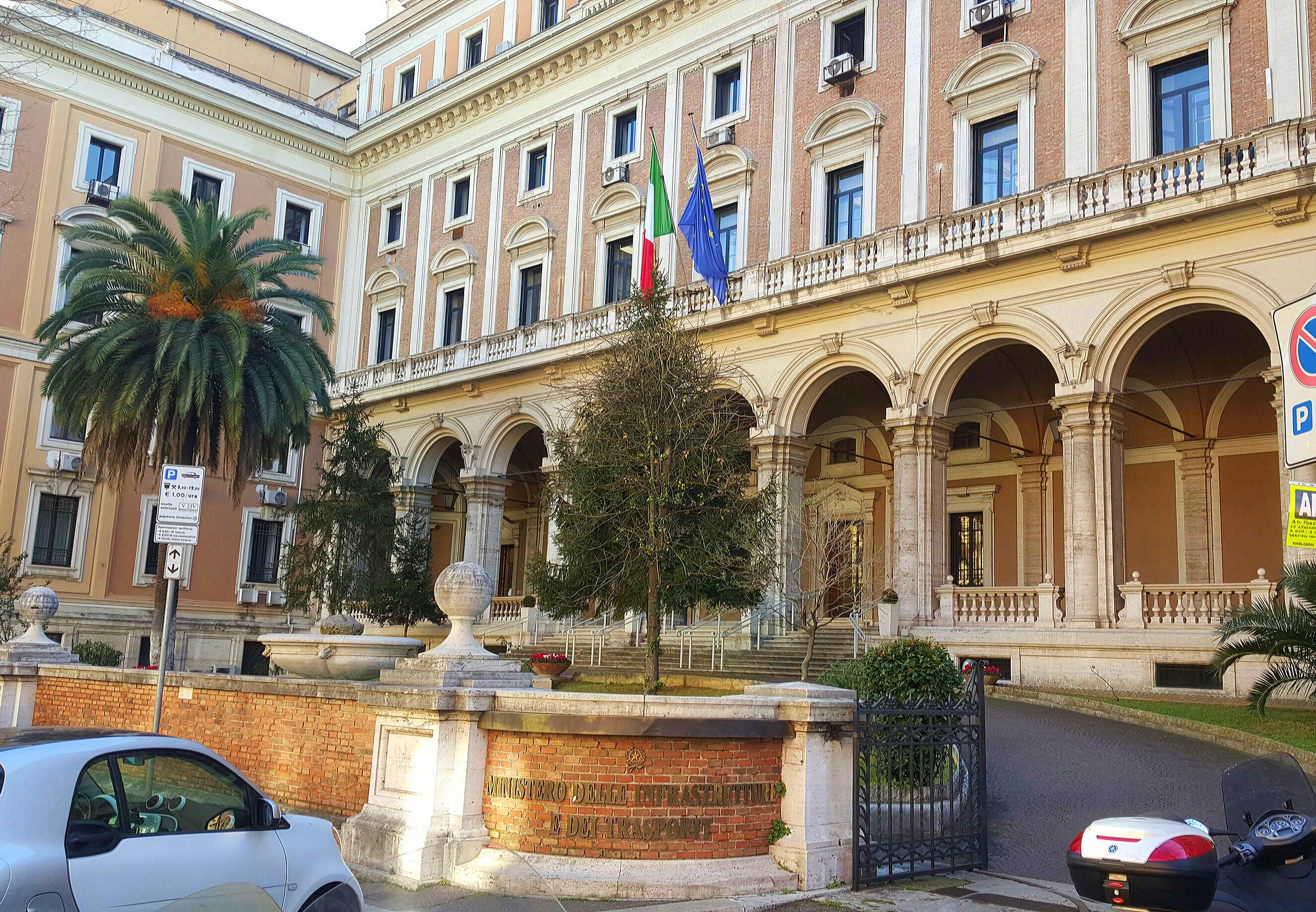 Sede del Ministero delle Infrastrutture e dei Trasporti a Roma.